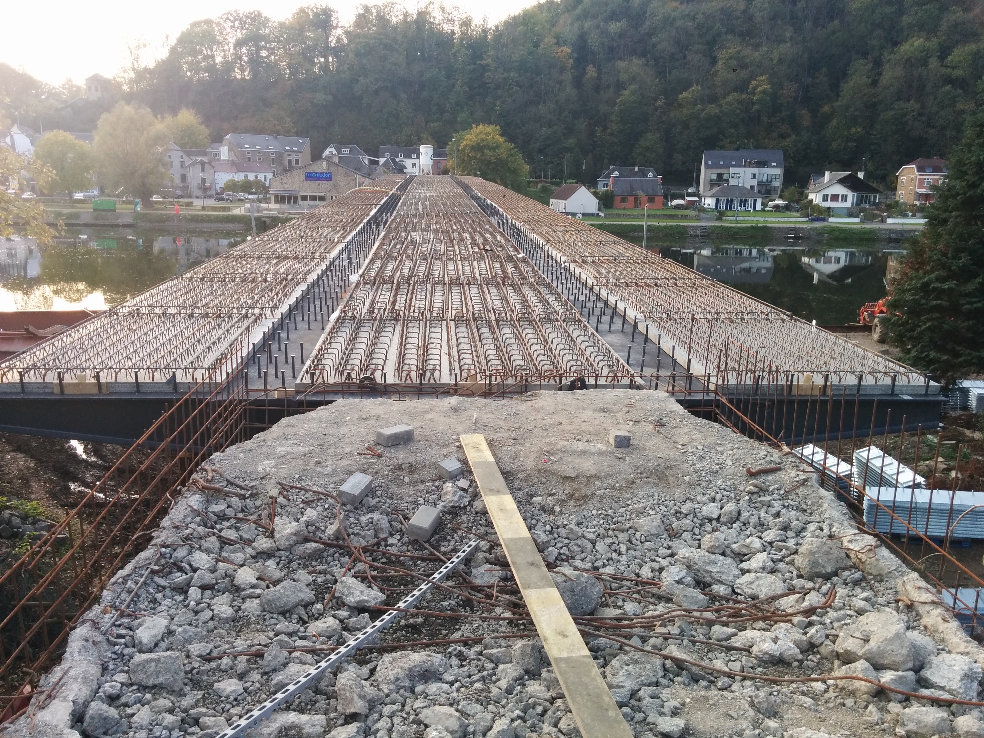 Travaux sur le pont de Godinne, juste après le chômage de la Meuse. On voit le tablier. This photo of immovable heritage has been taken in the Walloon Region